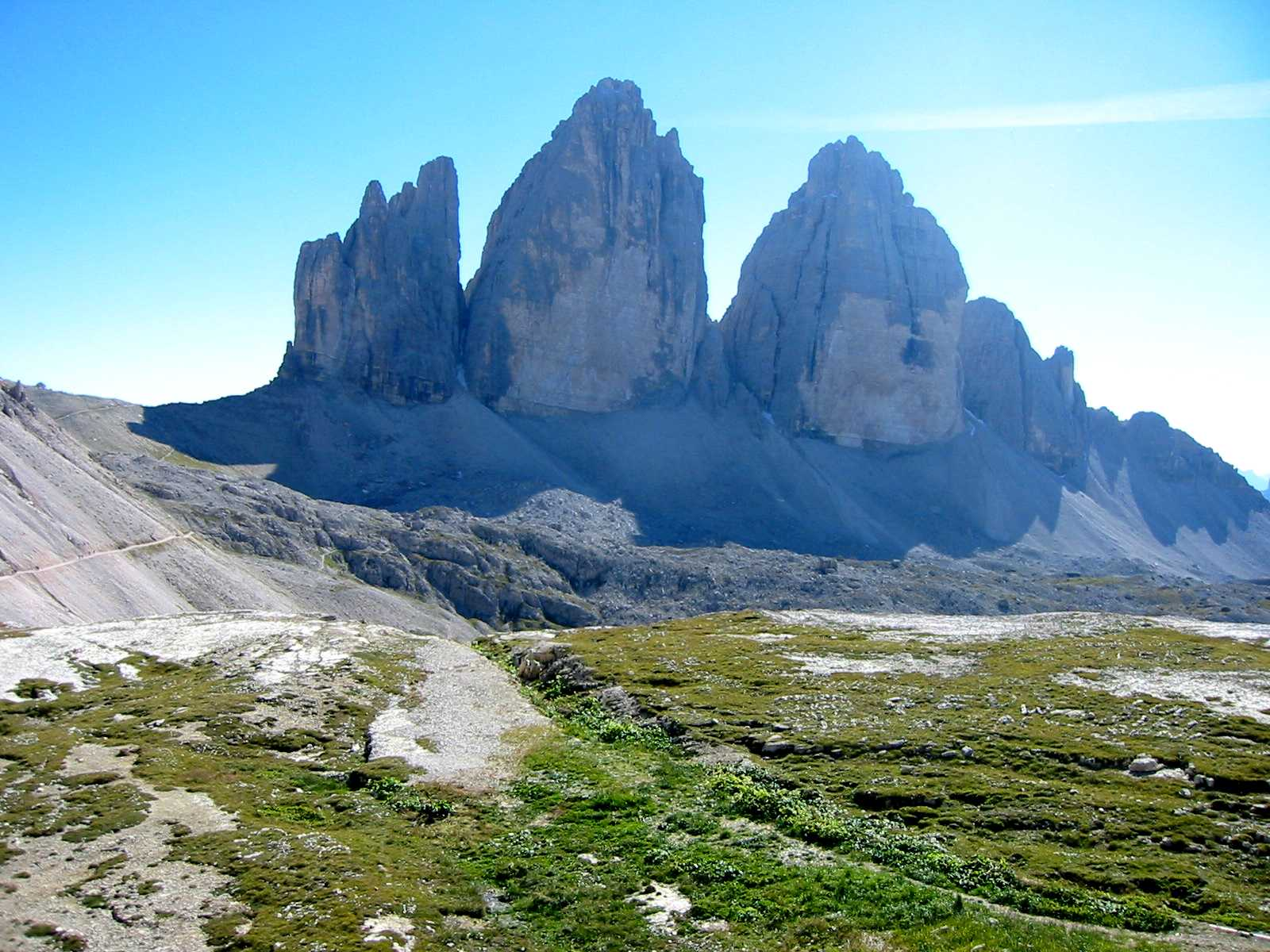 Drei Zinnen, fotografiert im September 2004 von Fantasy :-)